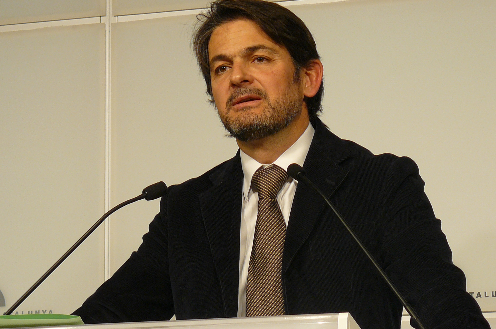 Oriol Pujol a la sala de premsa del Parlament.